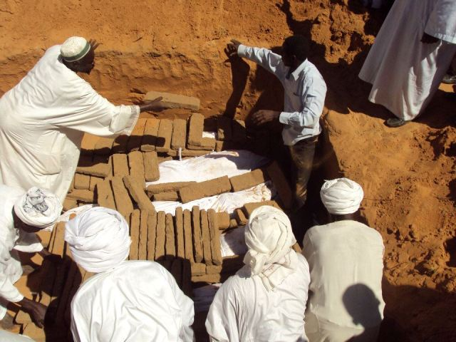 دفن ضحايا مجزرة شاوا في مقبرة جماعية بمدينة الفاشر بالسودان